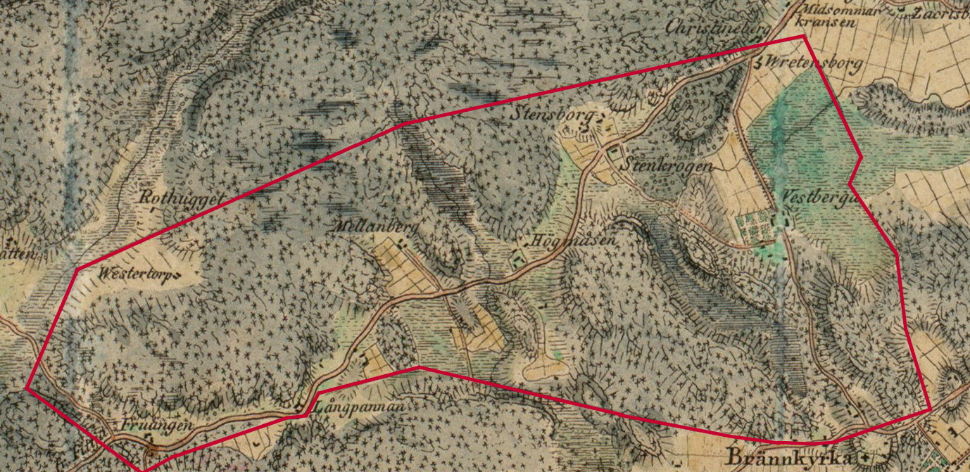 DEL AV KARTA: Stockholm med omgivningar 1817. Karta öfver Belägenheten omkring Stockholm / utgifven af W. M. Carpelan 1817. Kartan visar Västertorps gårds ägor (röd markering)